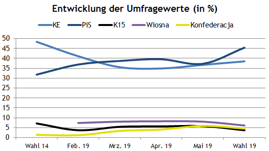 Europawahl 2019 Polen Umfragen